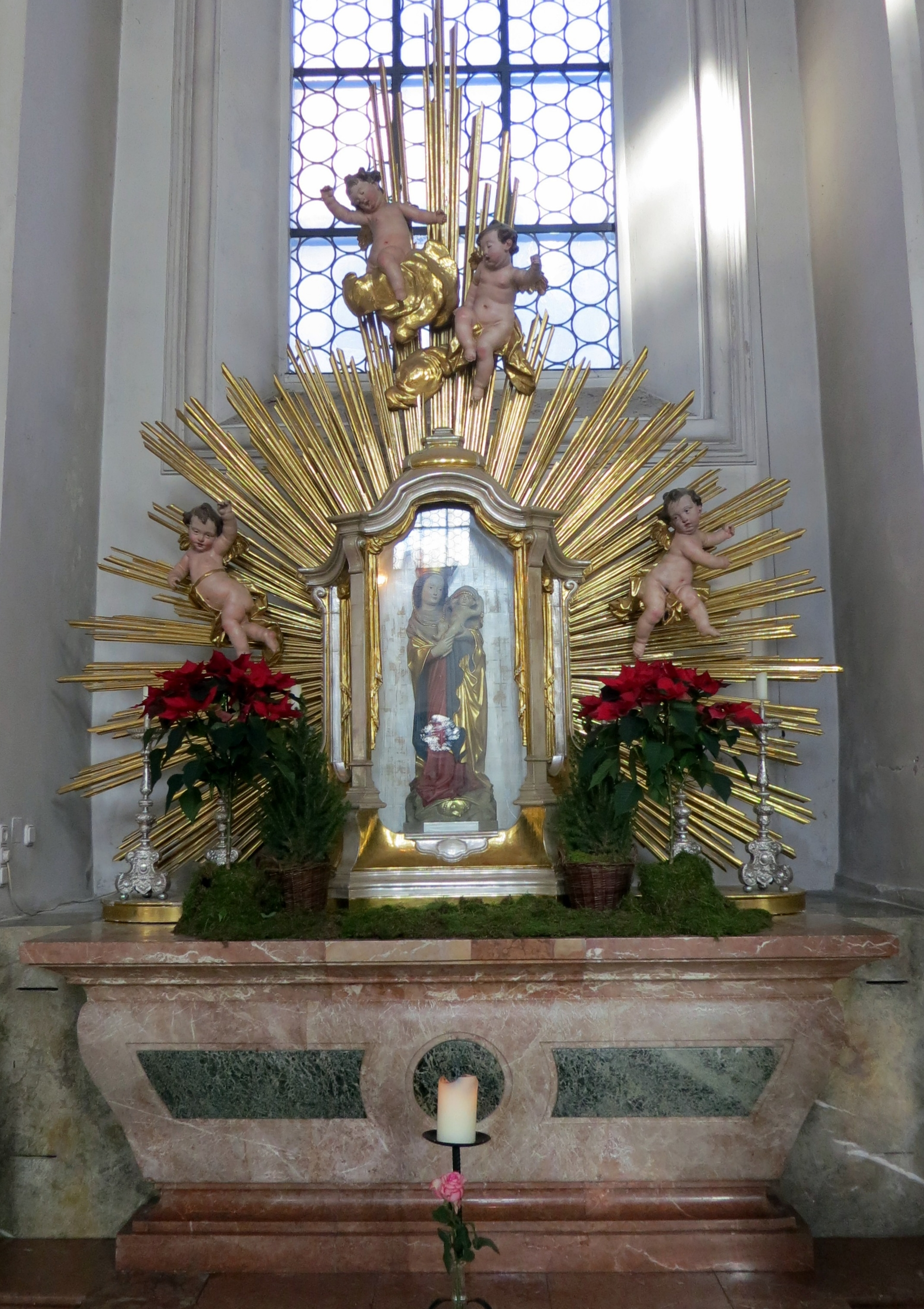 München, Heilig-Geist-Kirche, Marienaltar mit Hammerthaler Madonna